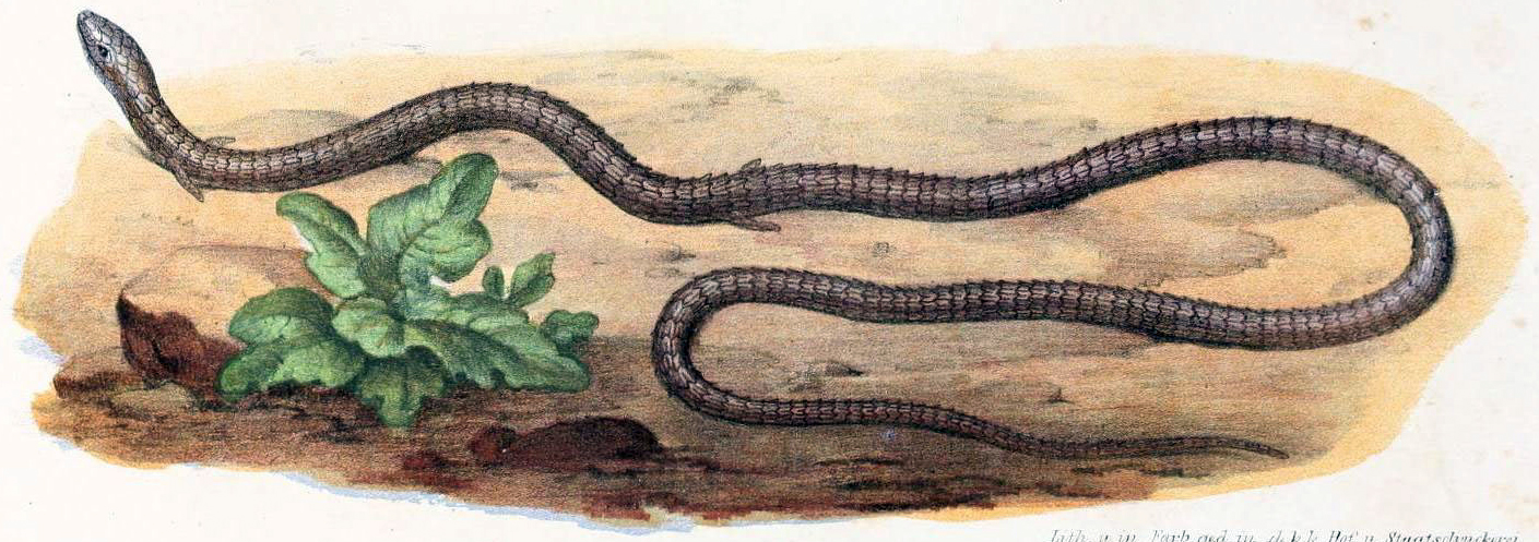 Chamaesaura anguina. Bilder-Atlas zur wissenschaftlich-populären Naturgeschichte der Wirbelthiere Wien :K.K. Hof-und Staatsdruckerei,1867.